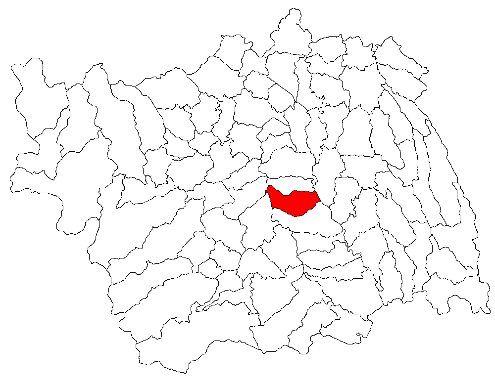 Categorie:Hărţi ale judeţului Bacău